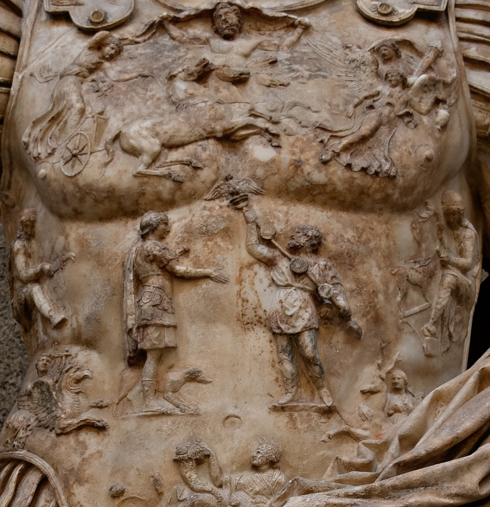 Detailansicht vom Brustpanzer der Augustusstatue von Prima Porta